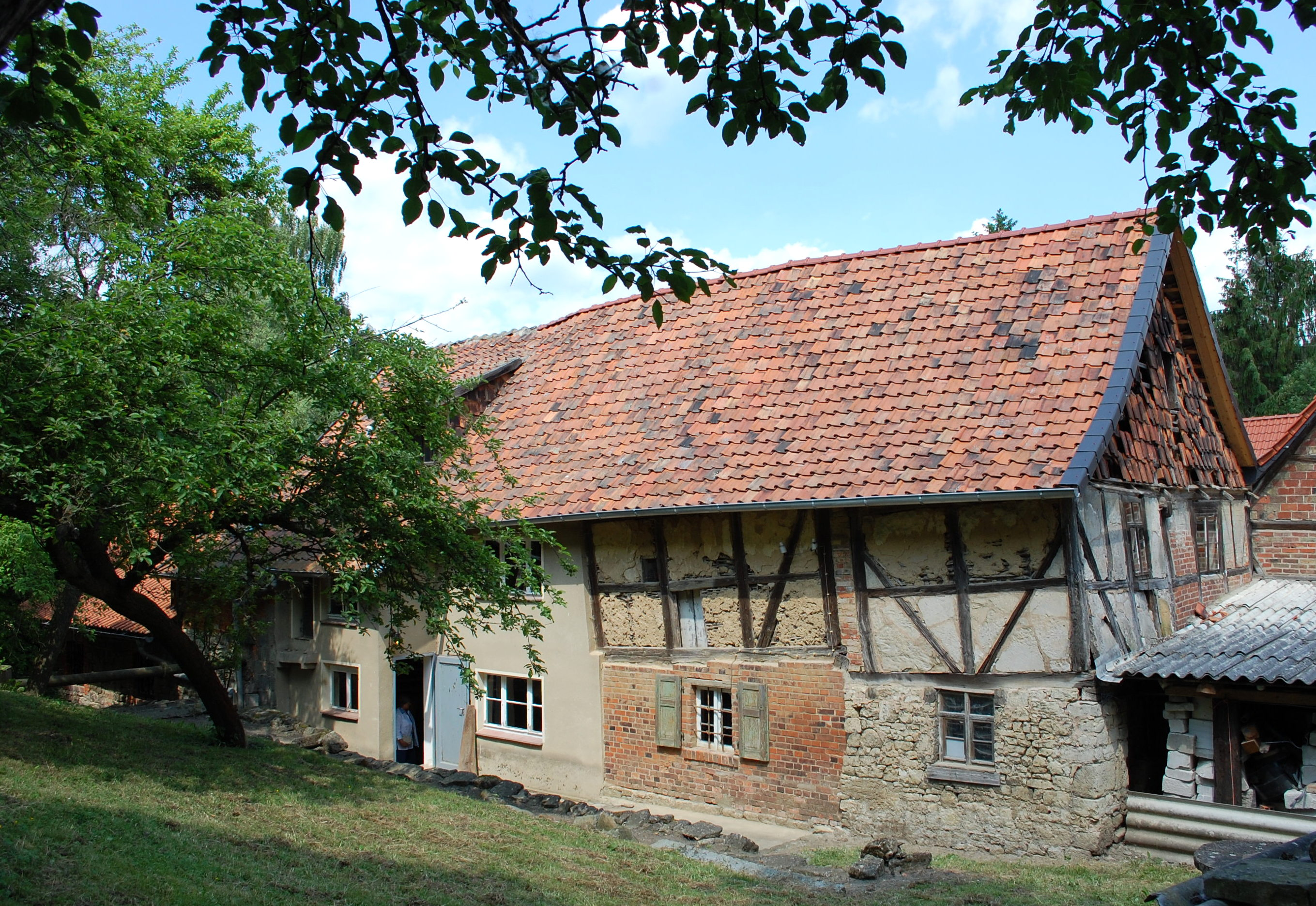 Gebäude der Kuckucksmühle